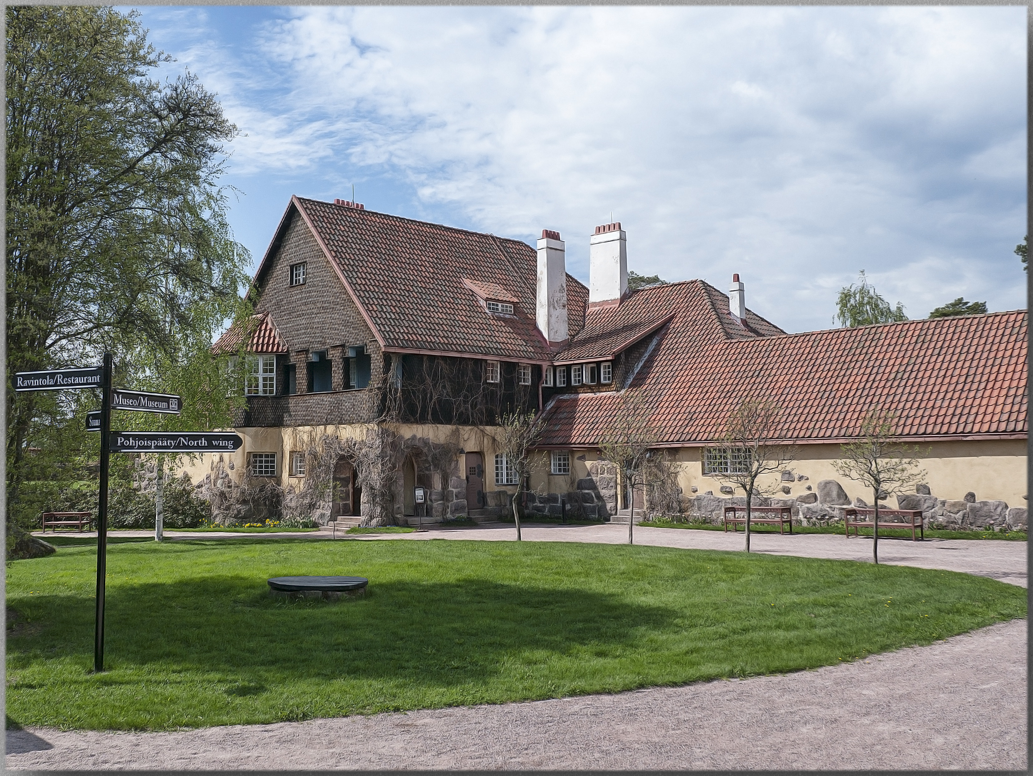 Hvitträsk; taiteilijakoti ja kulttuuriympäristö Kirkkonummella